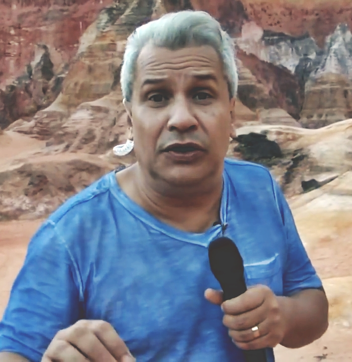 Apresentador da TV A Crítica e RedeTV!.